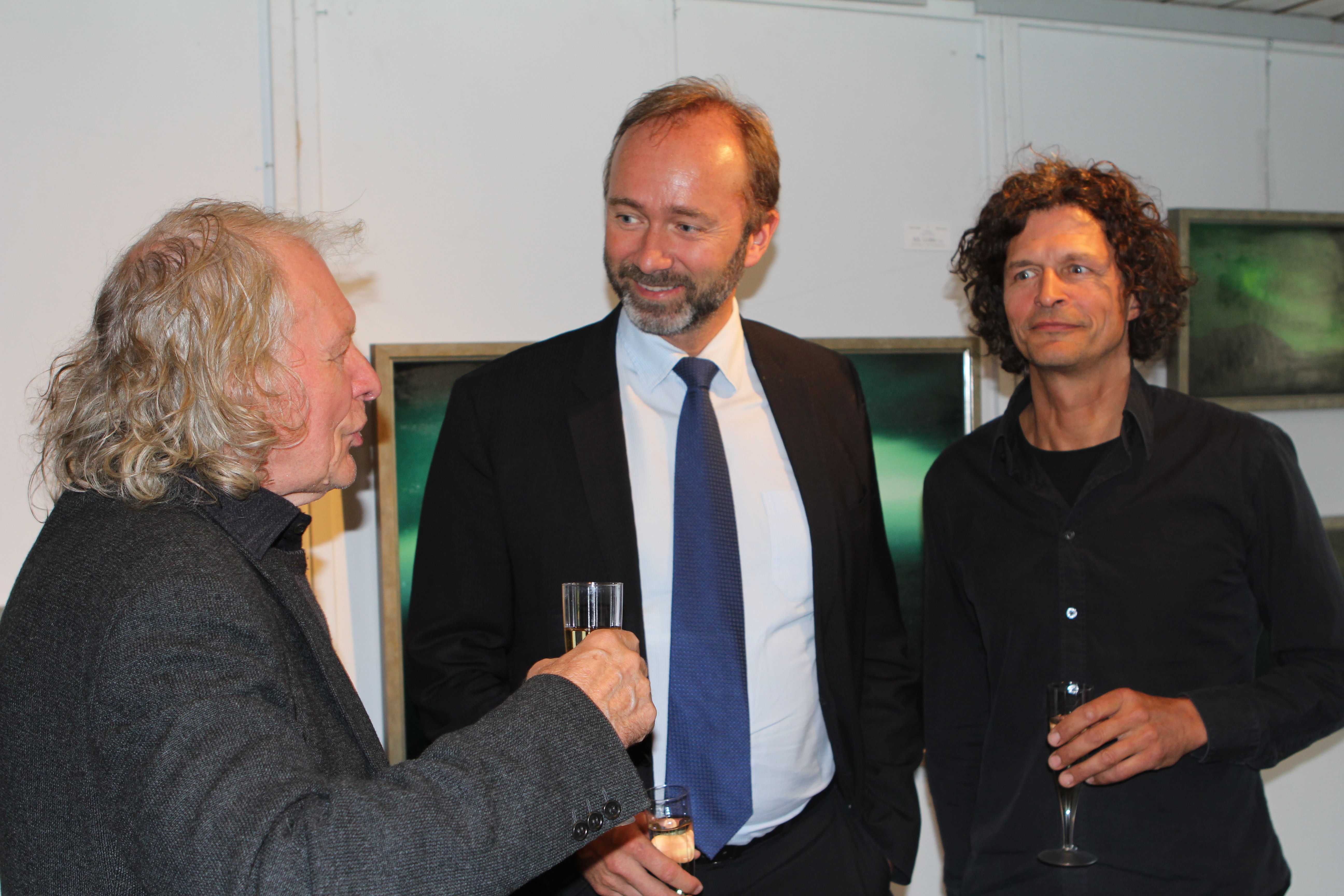 Trond Giske i samtale med kunstnerne Frans og Thomas Widerberg på deres utstilling om nordlyset. Giske åpnet utstillingen under romfartsjubileet.